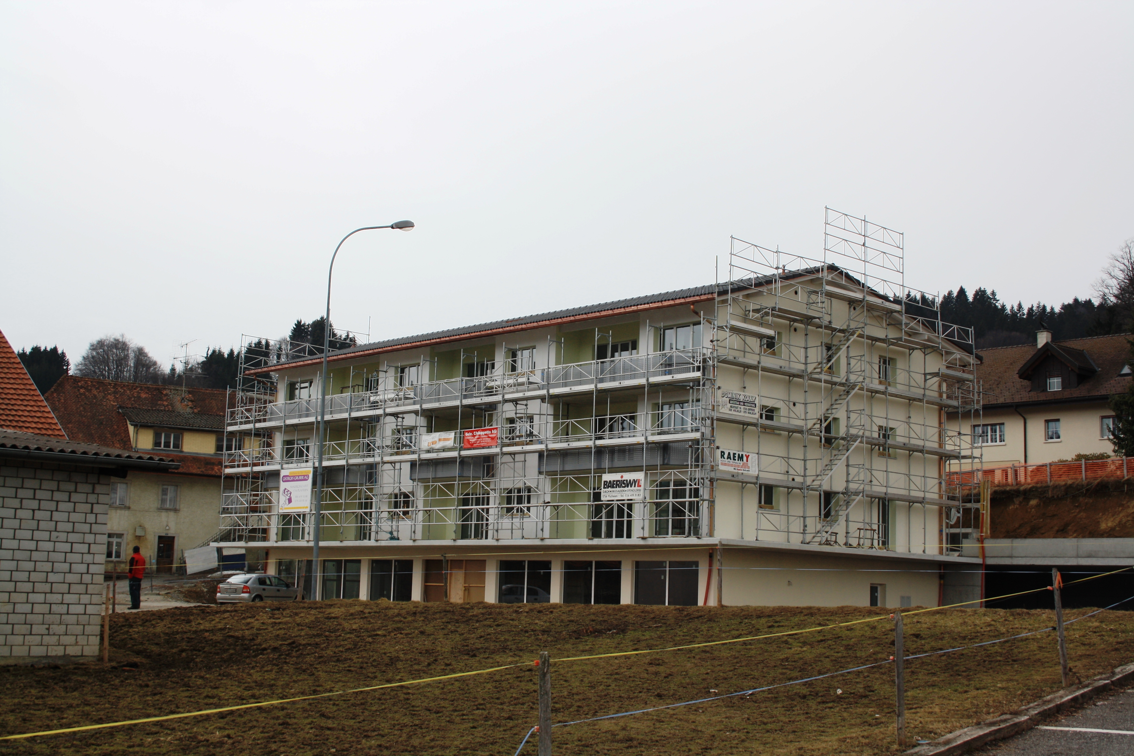 Dorfzentrum im Bau, Brünisried, Kanton Freiburg, Schweiz